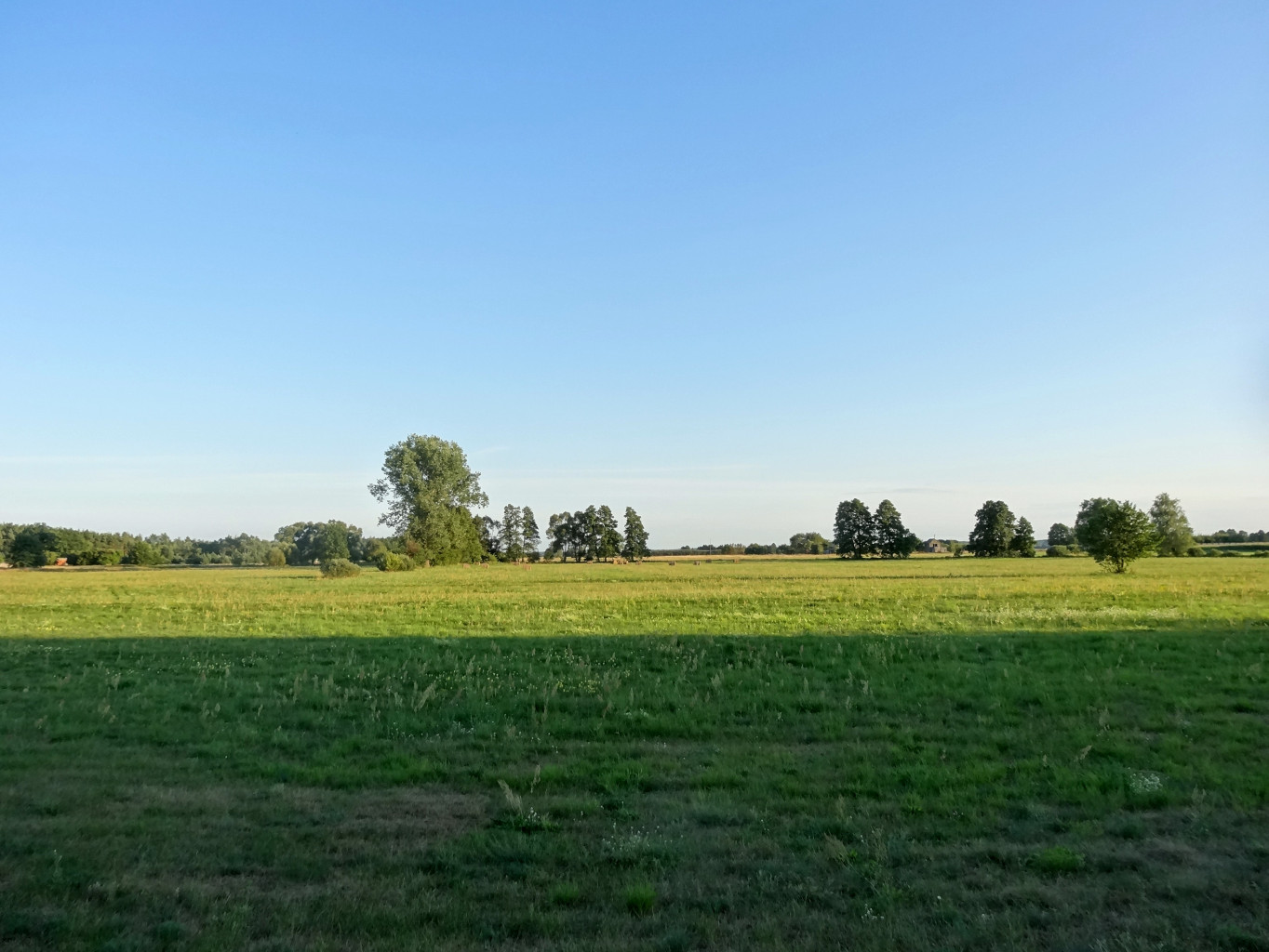 Olimpin, gmina Nowa Wieś Wielka, powiat bydgoski